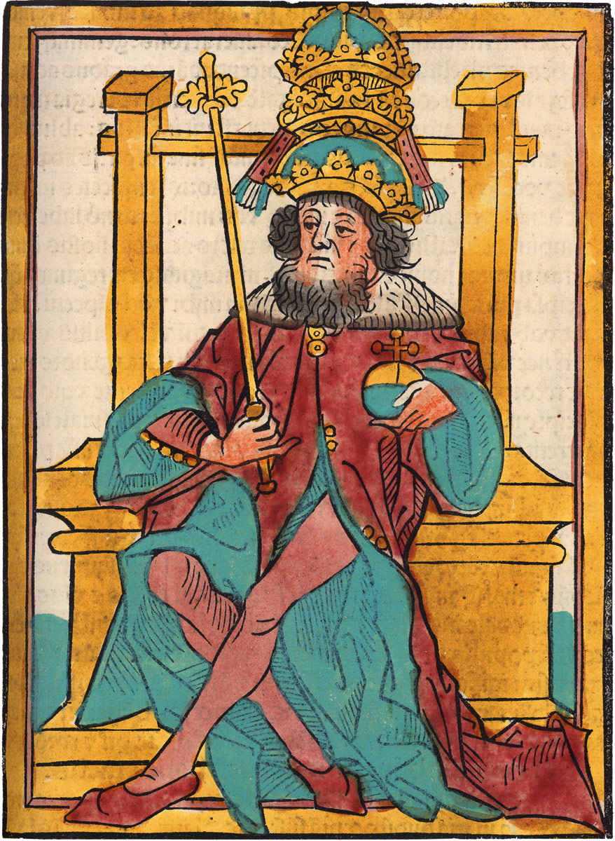 Chronica Hungarorum. EA. Brünn 1488